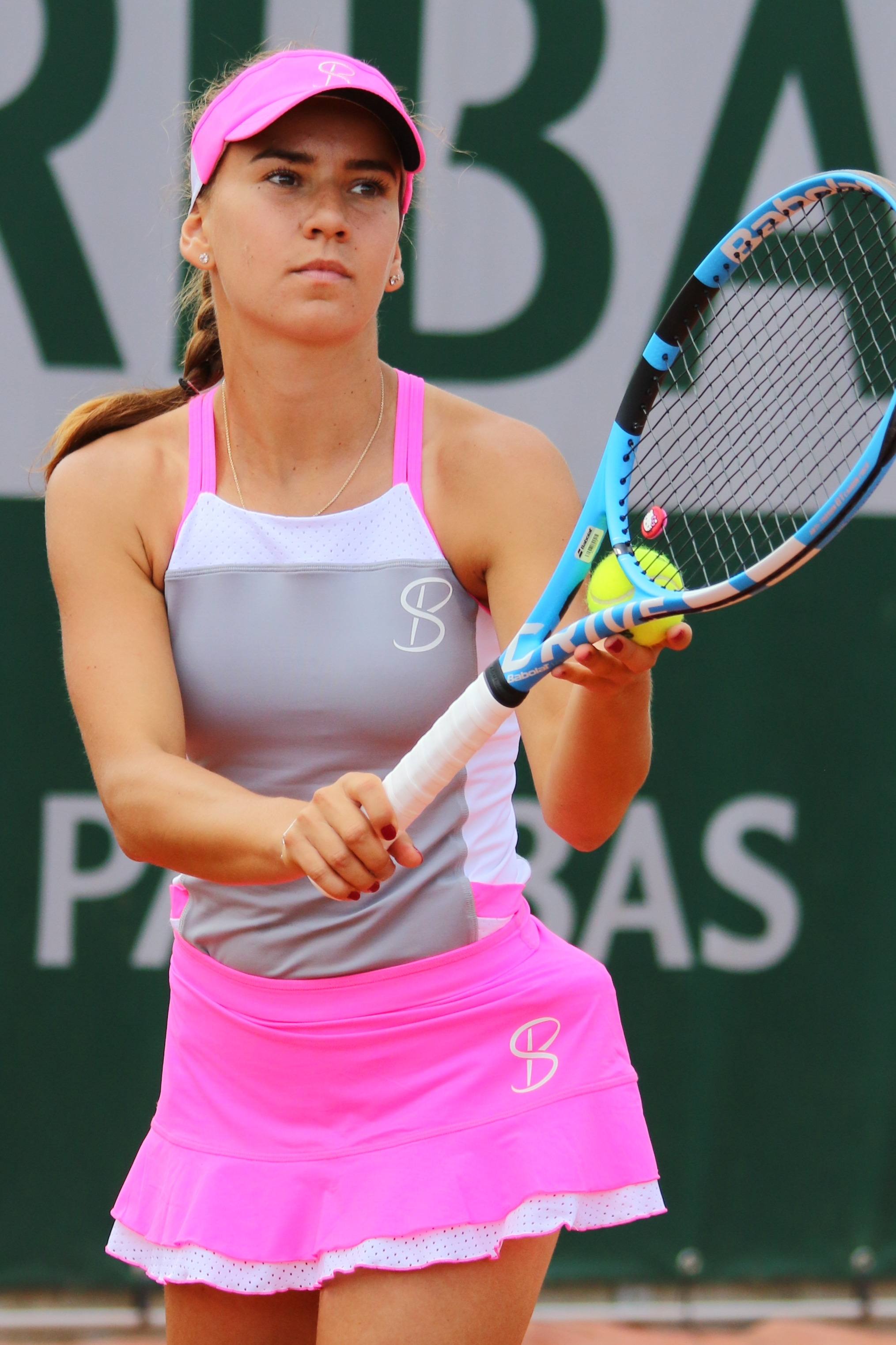 Bara RG18 (17)